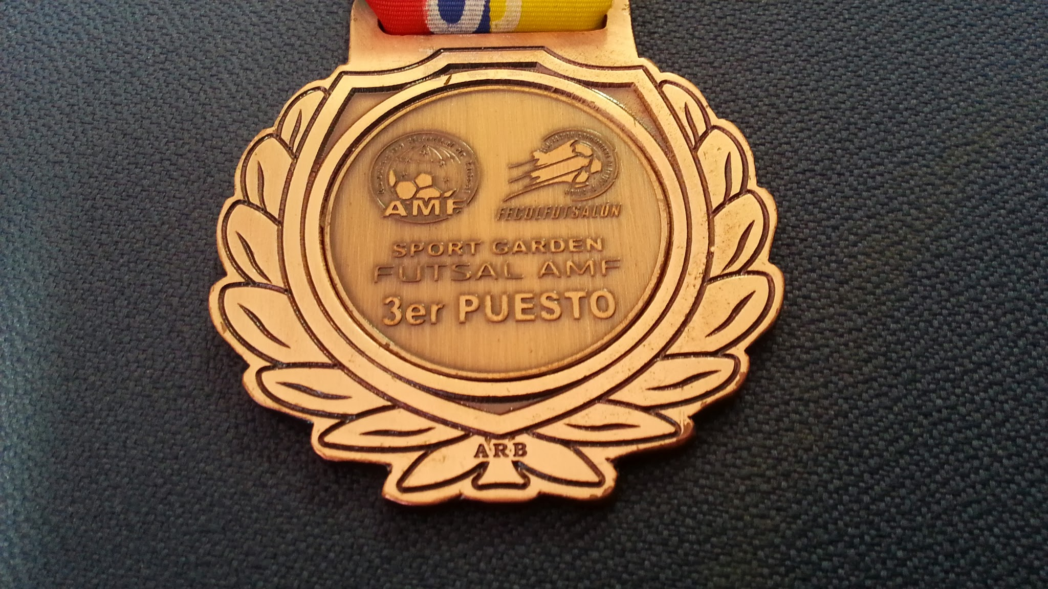 Medalha de bronze do Brasil nos Jogos Mundiais 2013 na modalidade Futebol de Salão AMF